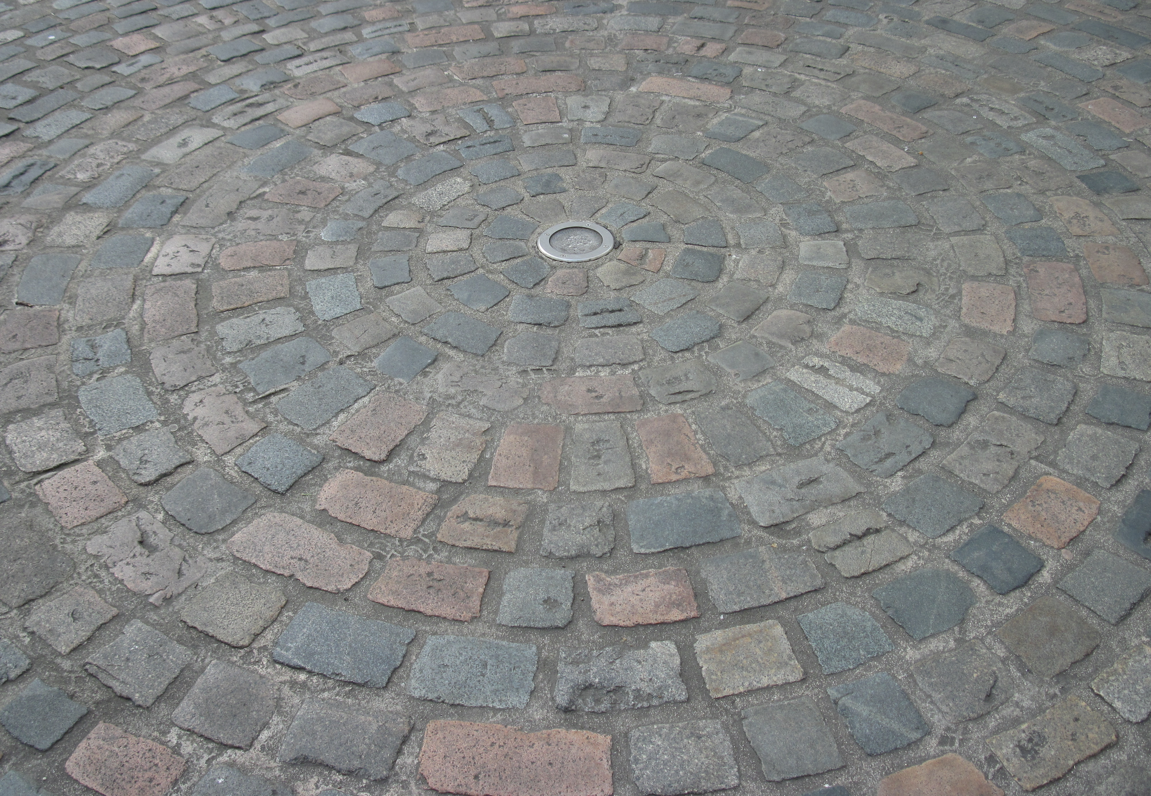 Pavés, Place d'Avranches, Saint Hélier, Jersey